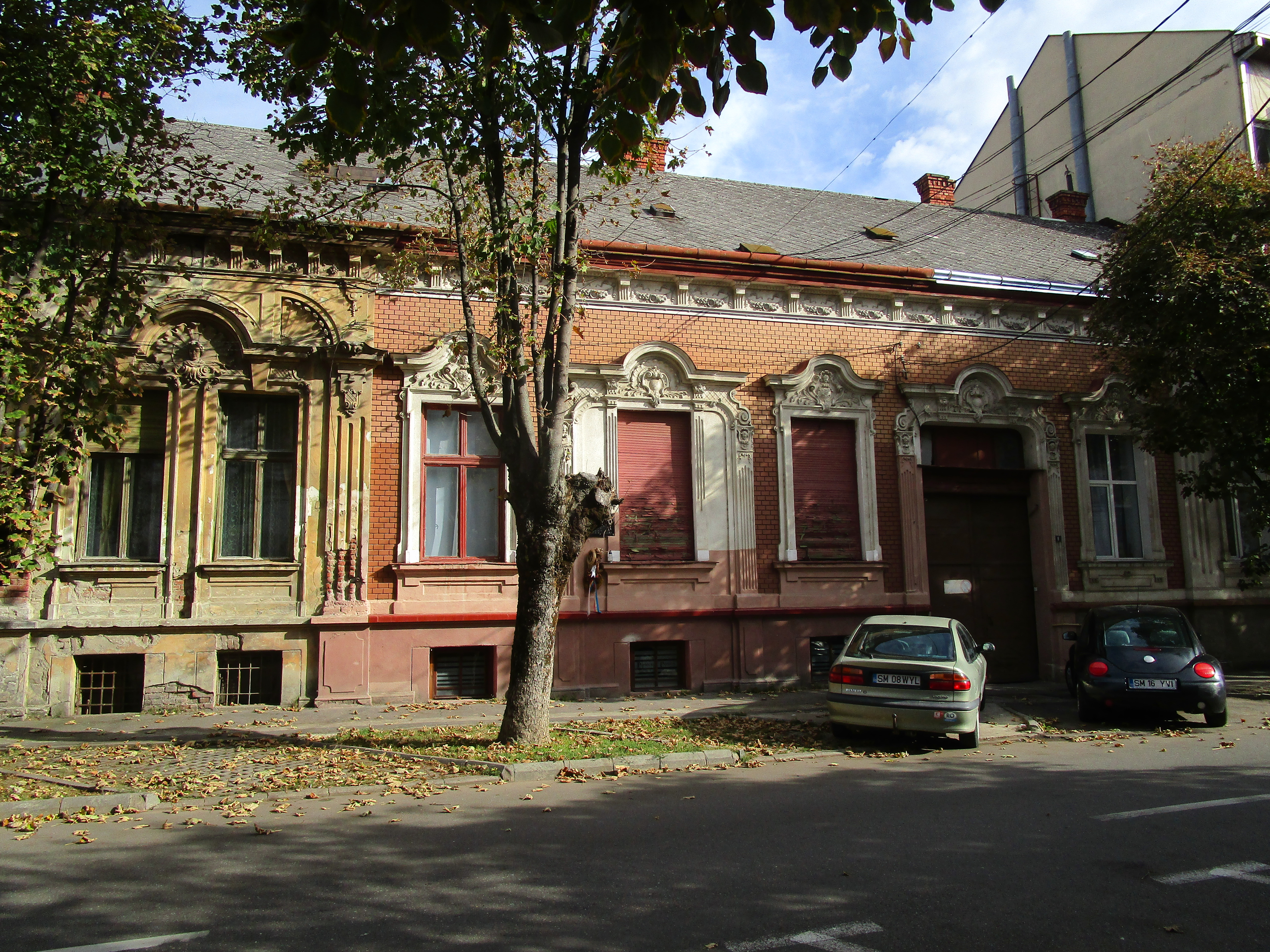 Casa Alexandru Ferențiu